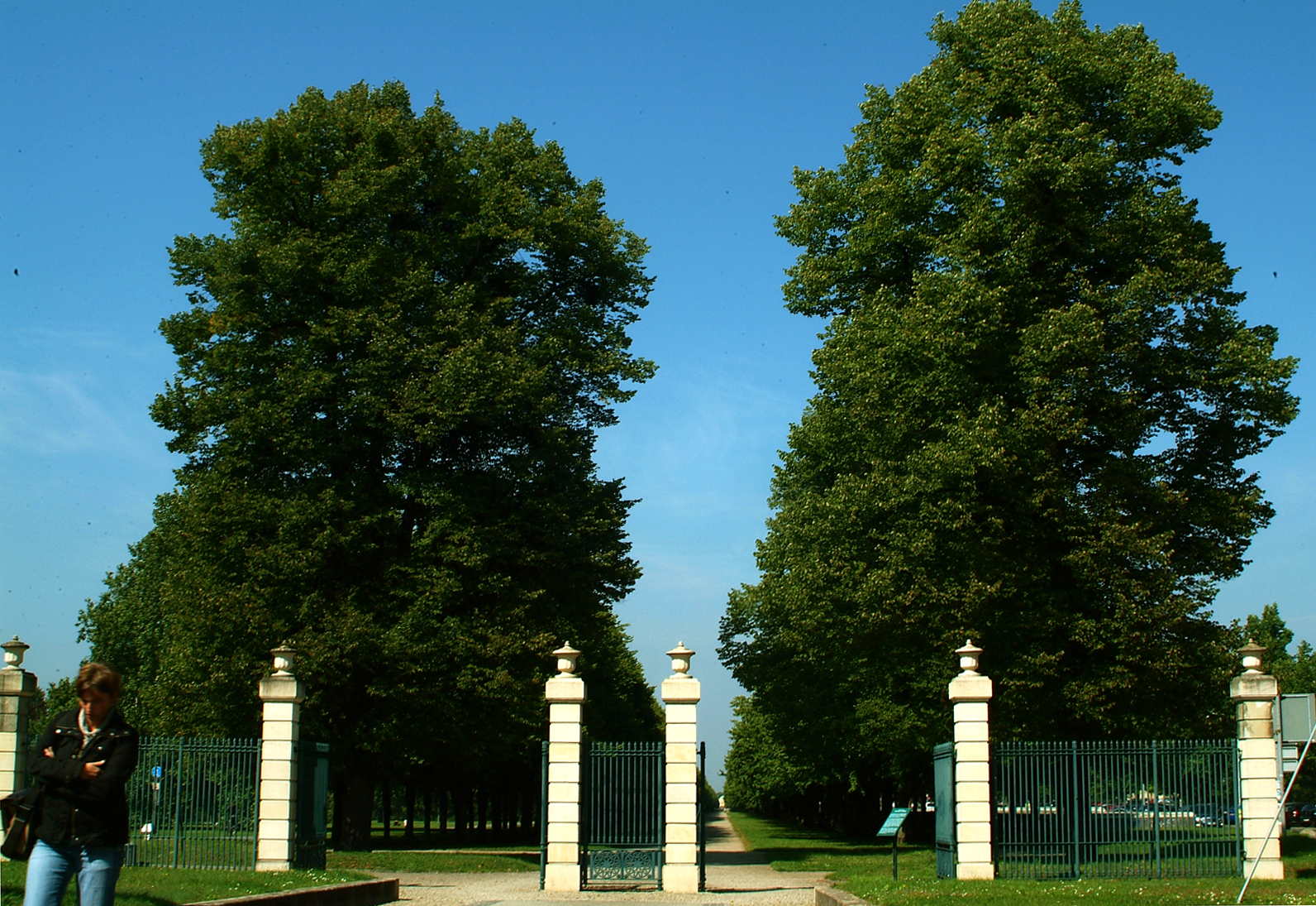 Der Eingang der Herrenhäuser Allee.